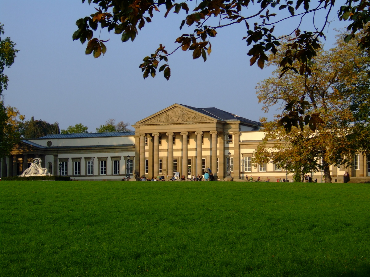 Das Lichtbild zeigt das Schloß Rosenstein zwischen der Innenstadt und Bad Cannstatt inmitten des Rosensteinparkes im Herbst 2006. Aufgenommen durch Benutzer MBL. Kamera: Fujifilm Finepix E900 -Daten siehe Metadaten